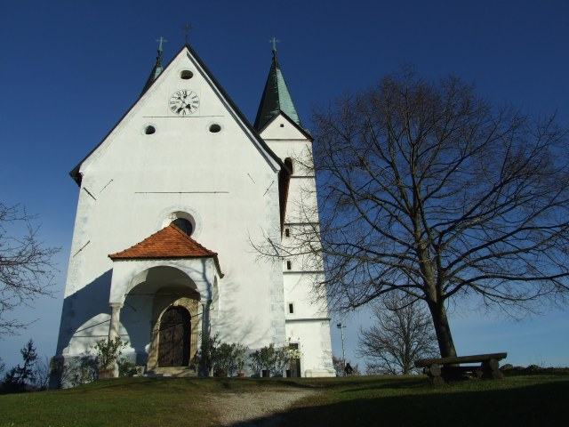 Templom az egyik Laško melletti hegy csucsán, Szlovénia